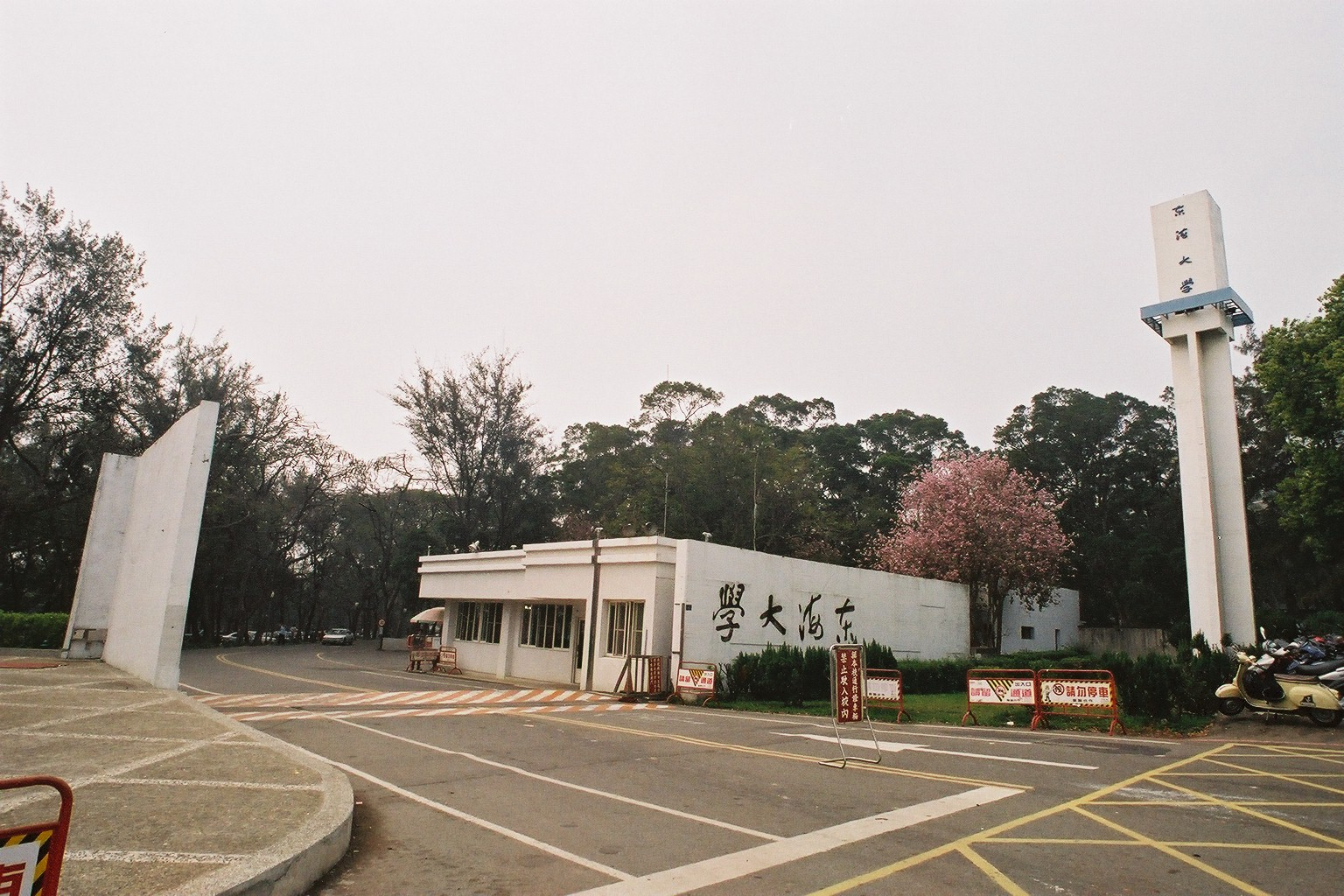 東海大学 (台湾)の正門